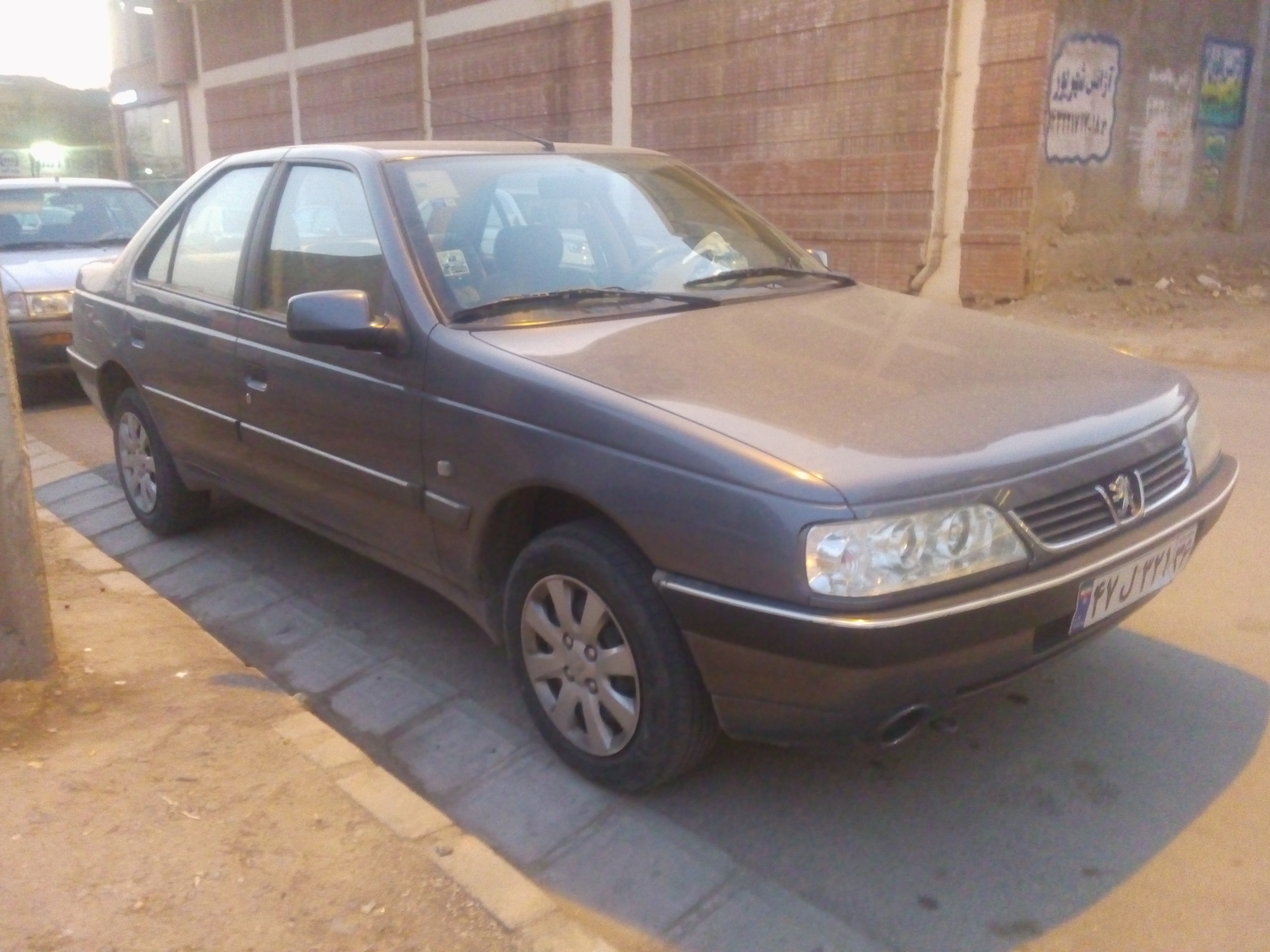 پژو 405 SLX، نمای جلو.این خودرو توسط ایران خودرو طراحی شده و از موتور TU5 سود می برد.